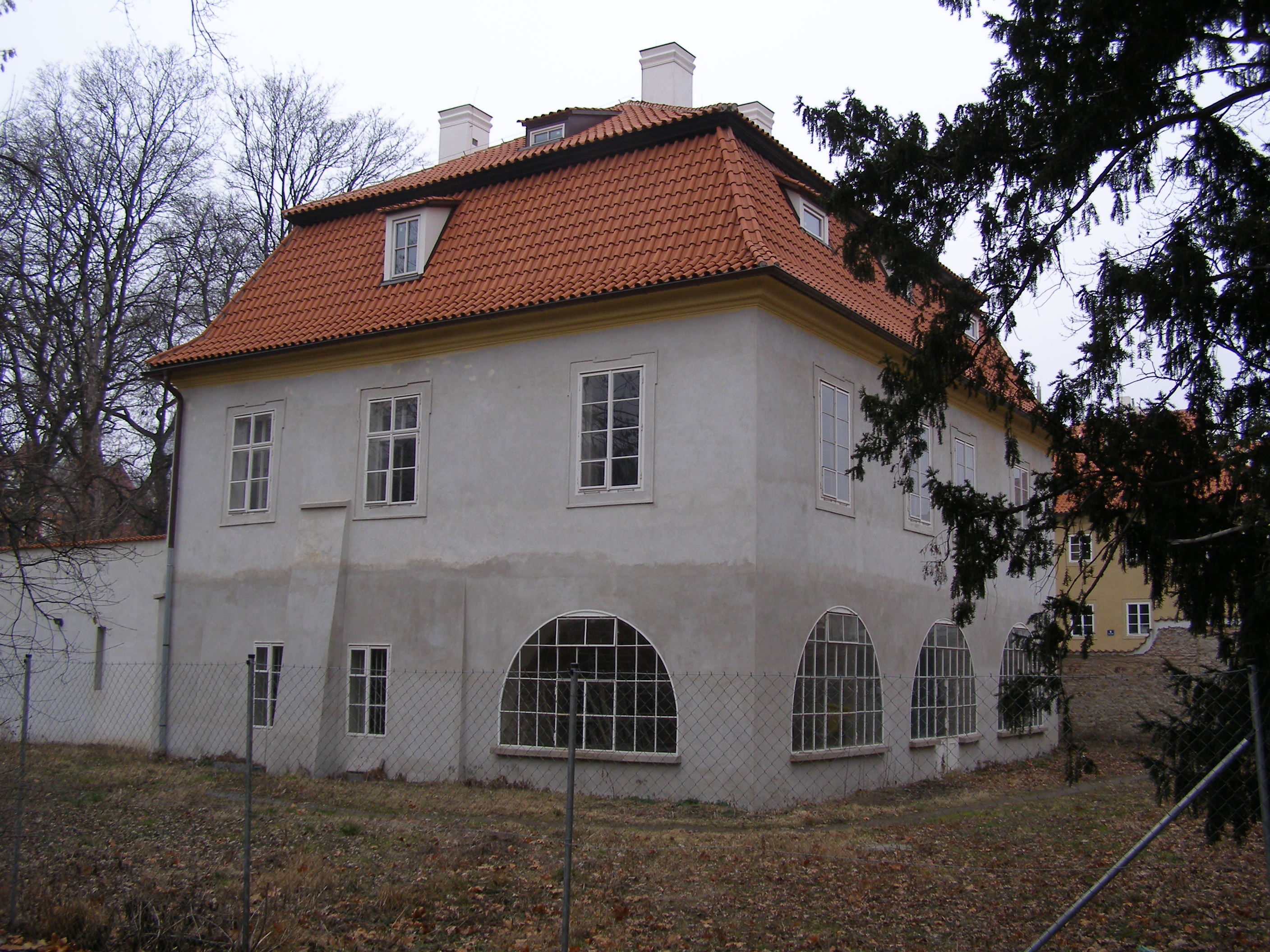 Werichova vila (koželužna), Praha 1-Malá Strana, U Sovových mlýnů 501/7